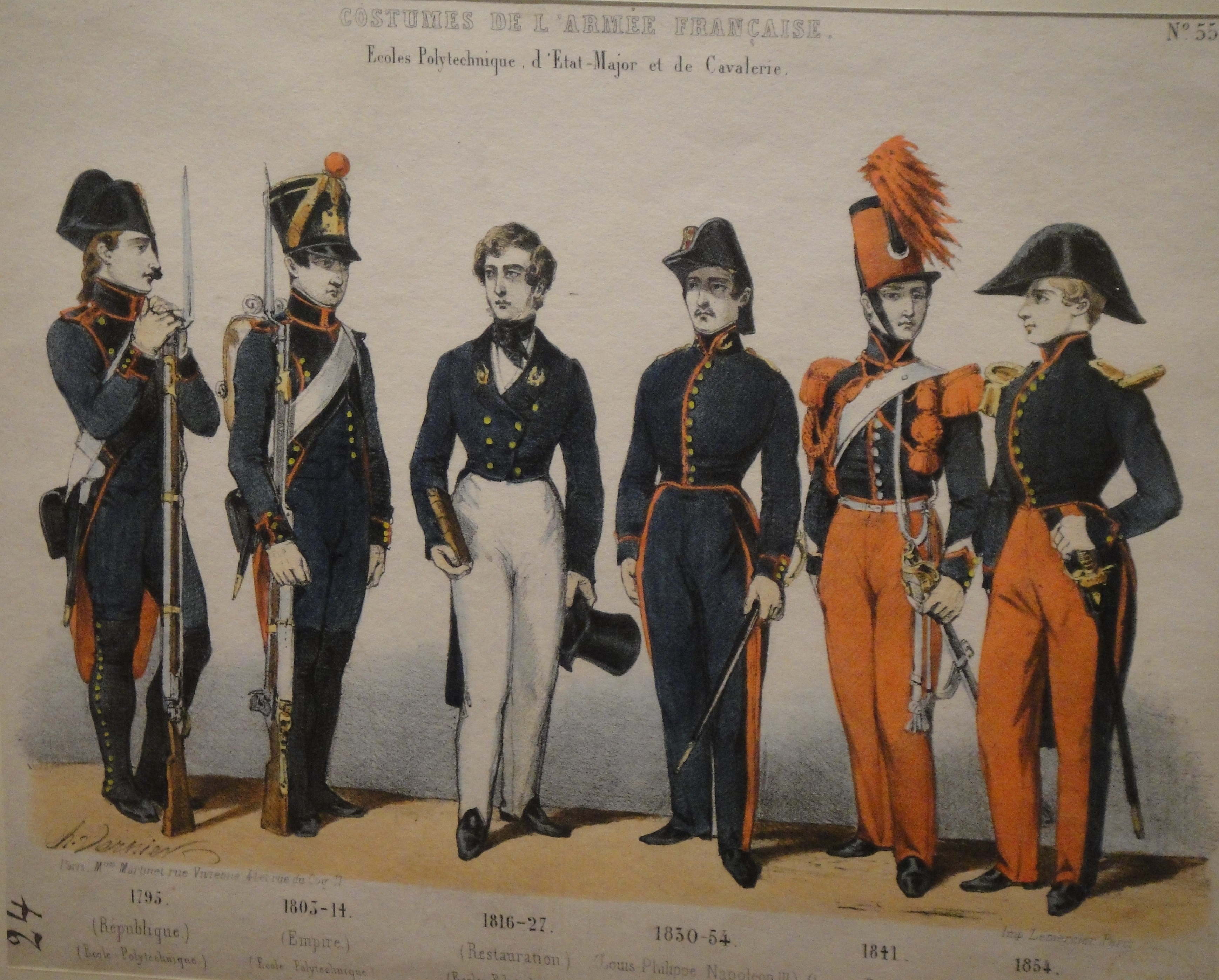 униформа учеников Политехнической Школы, 1795-1854 (экспозиция в Ecole Polytechnique)